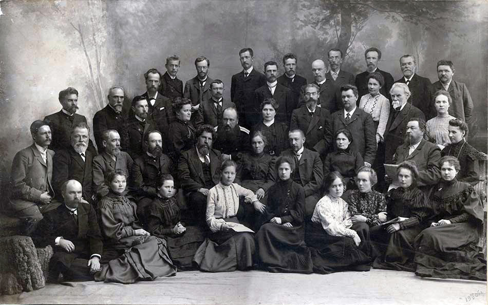 Павел Сергеевич Сигов (псевдоним SPS; 27 июля 1865, Пермская губерния — 1937, Екатеринбург) — учитель, акцизный чиновник, депутат II Государственной думы Российской империи от Пермской губернии (1907).